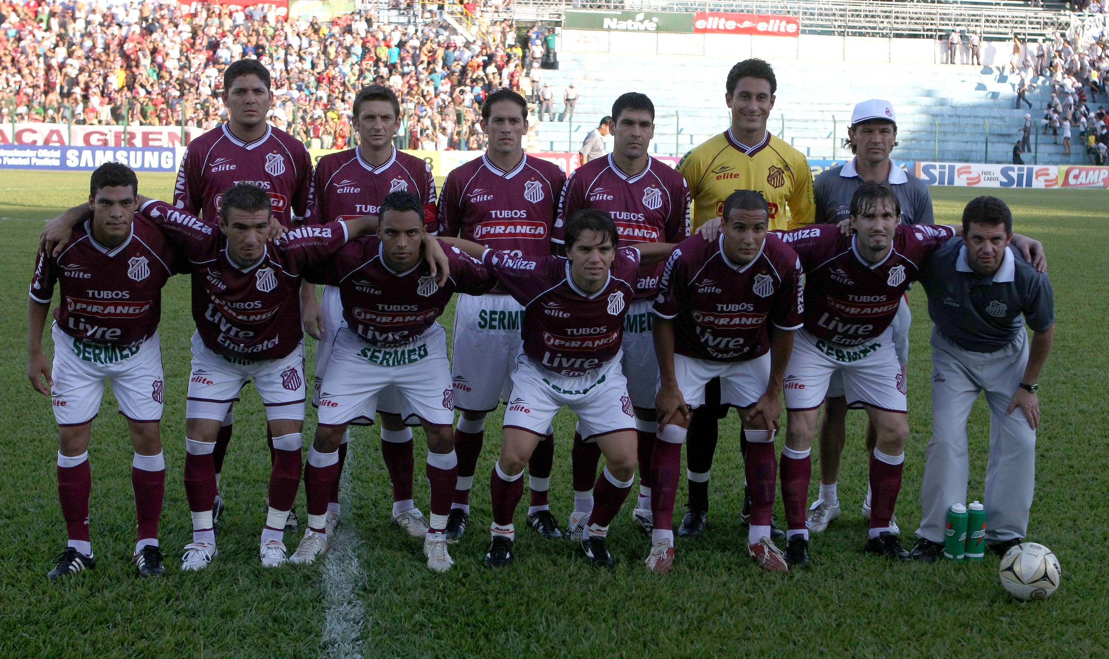 CAMPEONATO PAULISTA 2008 FUTEBOL ESPORTES SETÃOZINHO X SANTOS Time do Sertãozinho que iniciou a partida. - ESTÁDIO FREDERICO DALMAZO SERTÃOZINHO/SP BRASIL 01/03/2008 Foto: Junior Faria/GazetaPress código da foto